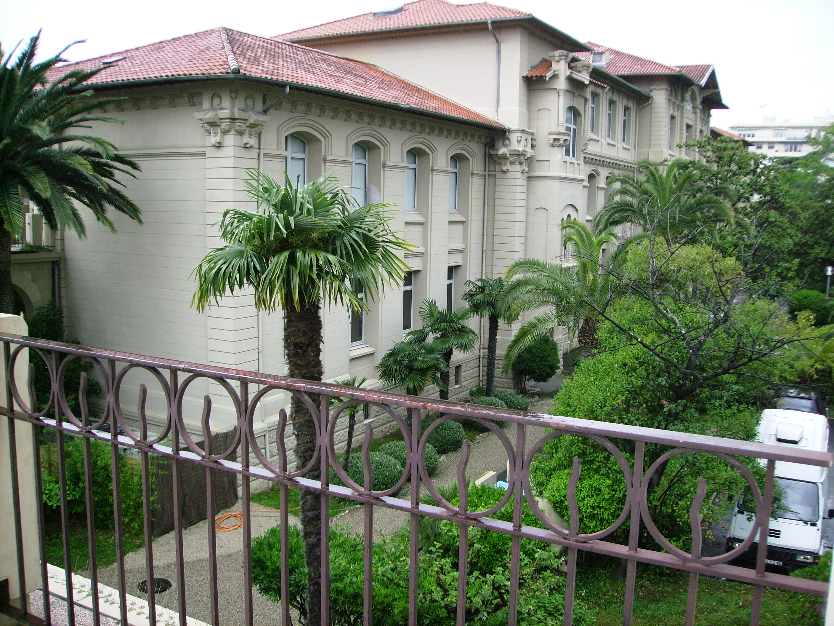 Lycée Carnot à Cannes (06, France)